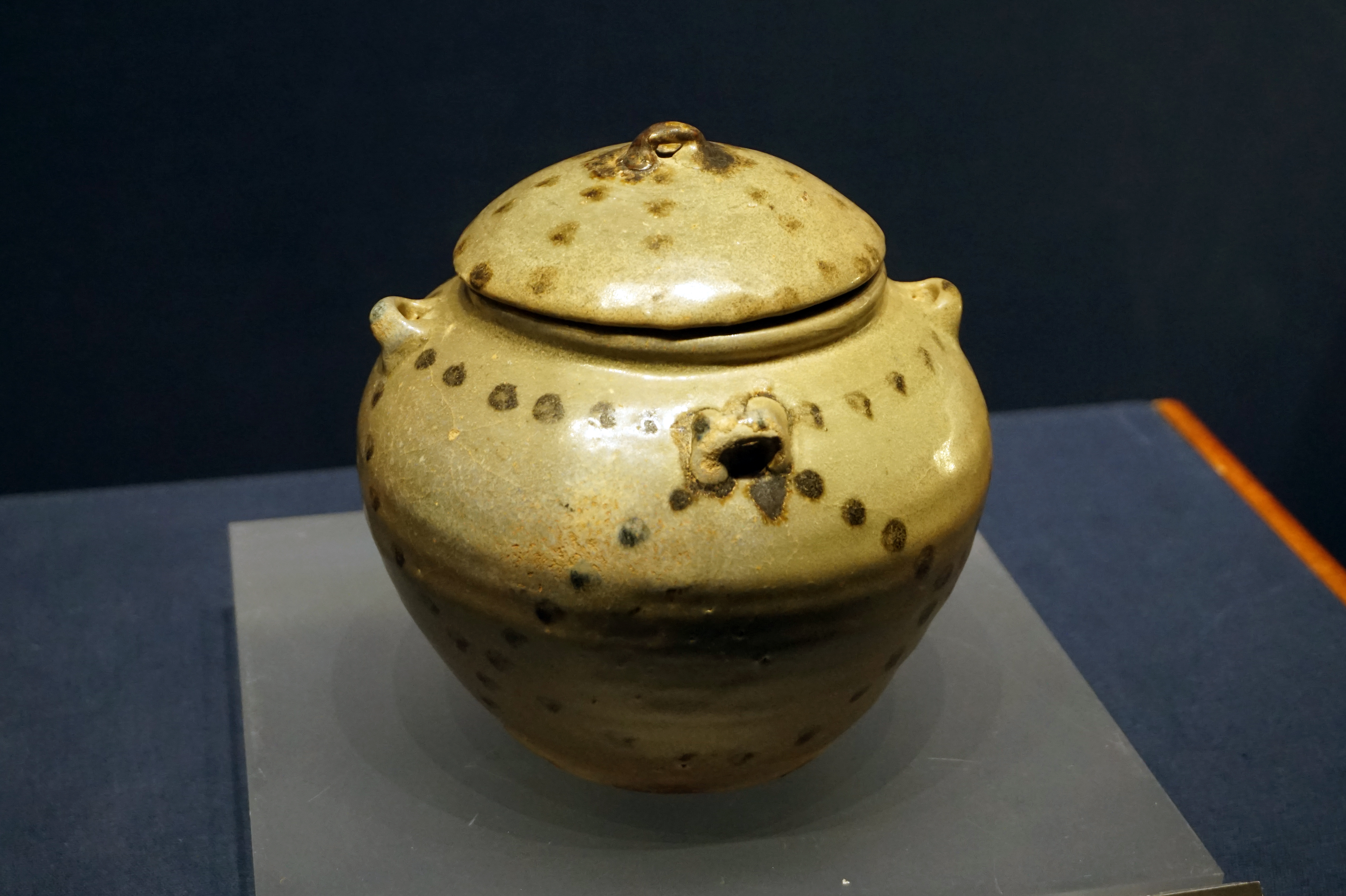 东晋瓯窑青釉褐色点彩四系带盖瓷罐。温州市博物馆藏。